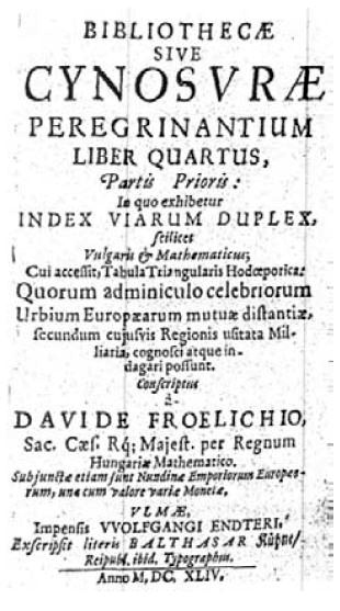 Titulná strana štvrtej kapitoly "Cinosura seu Bibliotheca Viatorum "(Ulm, 1644), autor David Frölich. Autor bol geograf, historik, astronóm, fyzik, chemik, filológ, pedagóg, cestovateľ... - jeden z najväčších vedcov Európy z obdobie sedemnásteho storočia. Narodil sa v Ľubici, okres Kežmarok. Žil v Kežmarku - Slovakia.